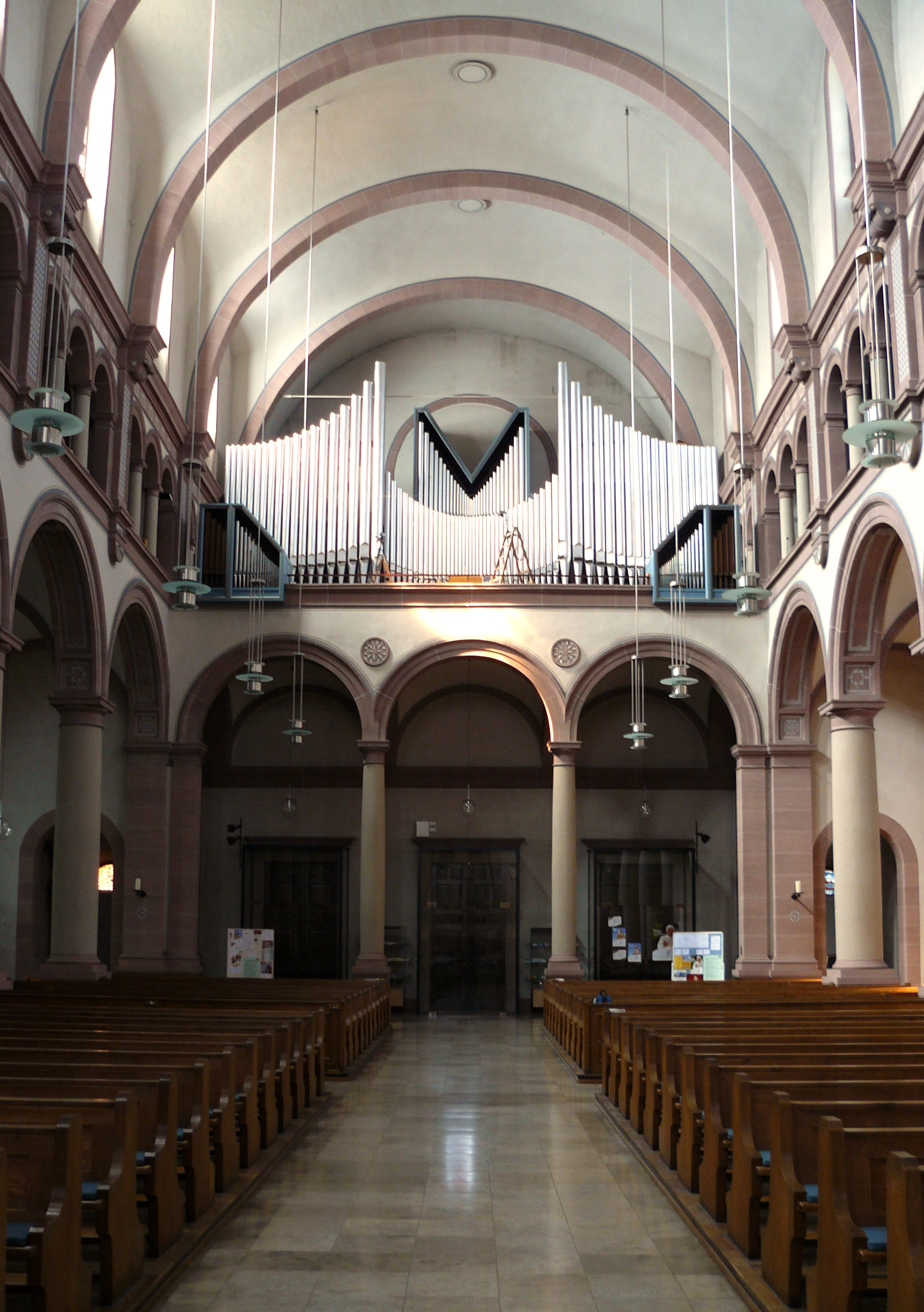 Orgel der katholischen Franziskuskirche in Pforzheim